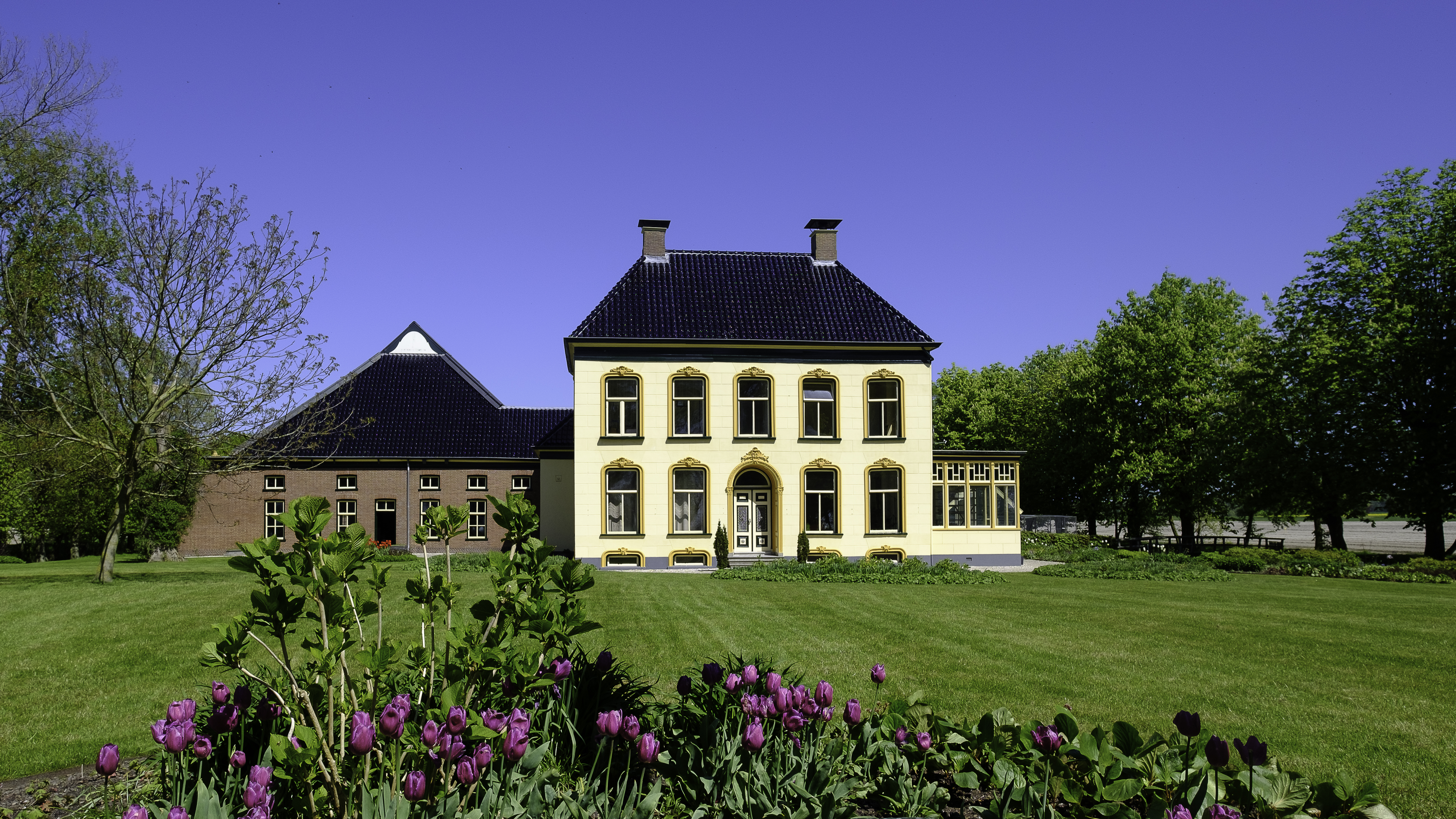 Dinghweer